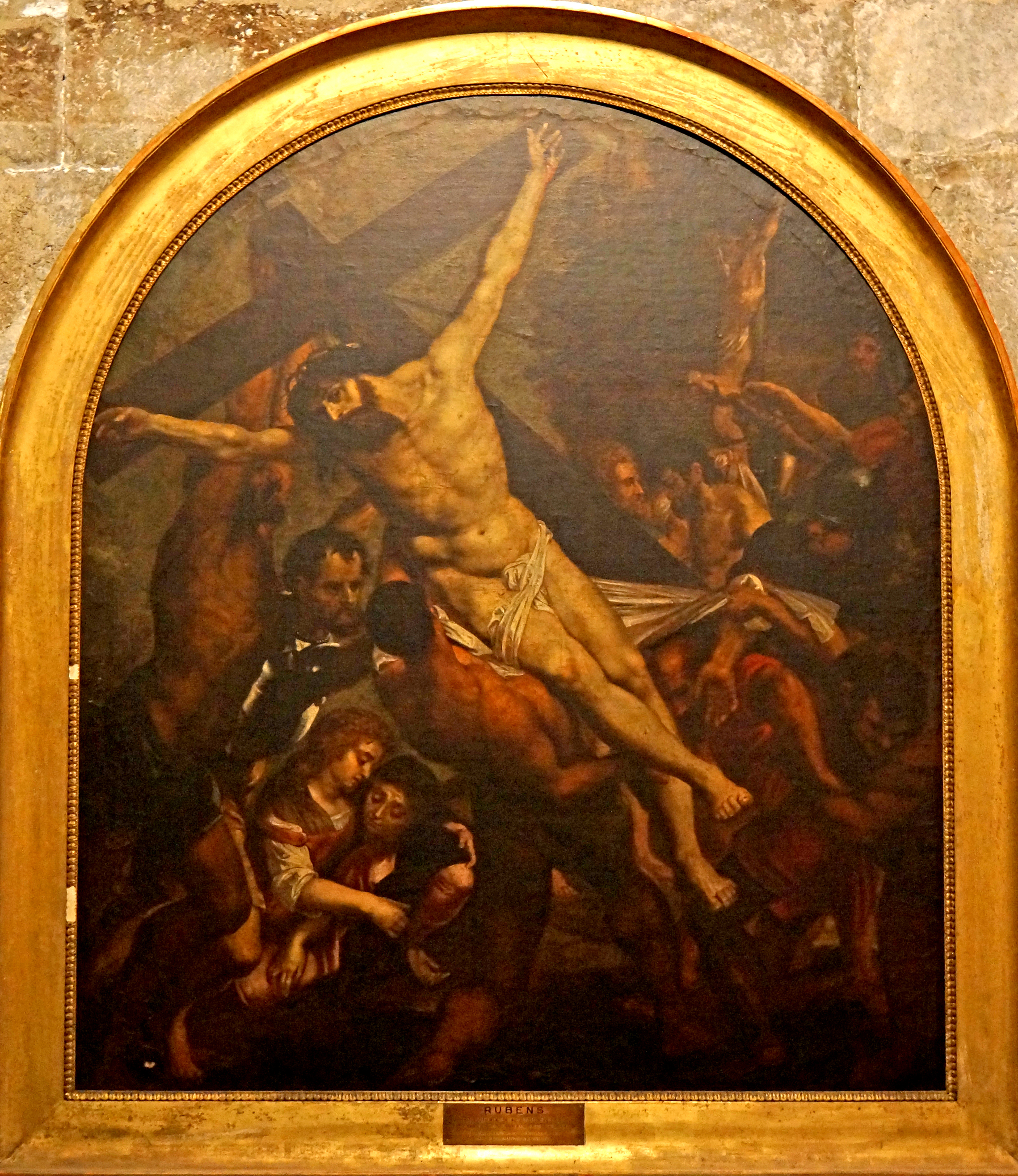 Copia realizada por un pintor anónimo del cuadro perdido de Rubens "La elevación de la cruz". La obra original fue pintada para la iglesia de Santa Croce in Gerusalemme (Roma) hacia 1601-1602, pero se perdió en un naufragio cuando era transportada (después de 1820). La copia de autor anónimo pertenece a la capilla del Hospital Municipal de Grasse (Francia), pero se exhibe en depósito en la catedral de Notre-Dame-du-Puy de Grasse (Francia).